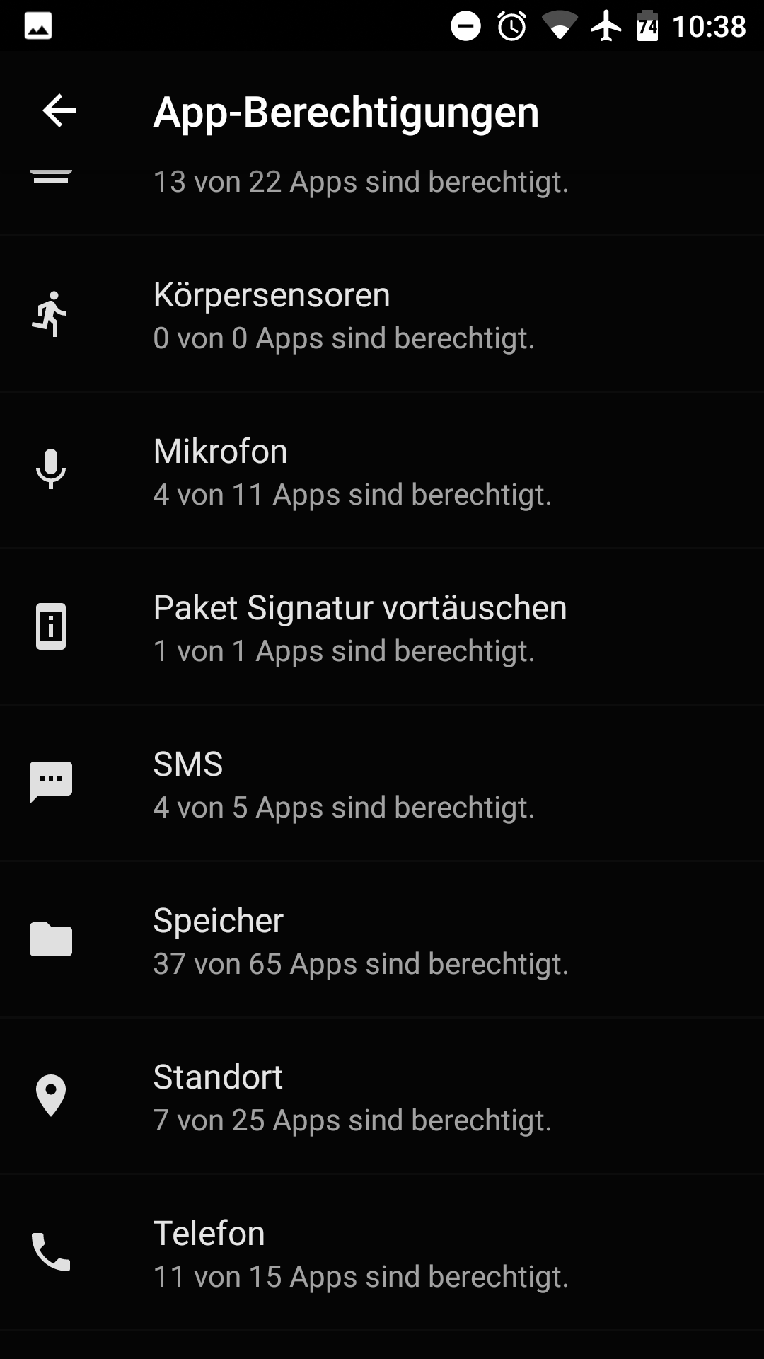 OmniROM Appberichtigung